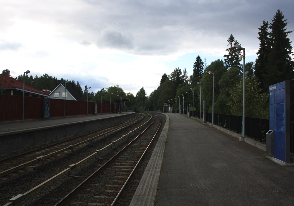 Holmen T-banestasjon sett fra perrongen mot Hovseter.